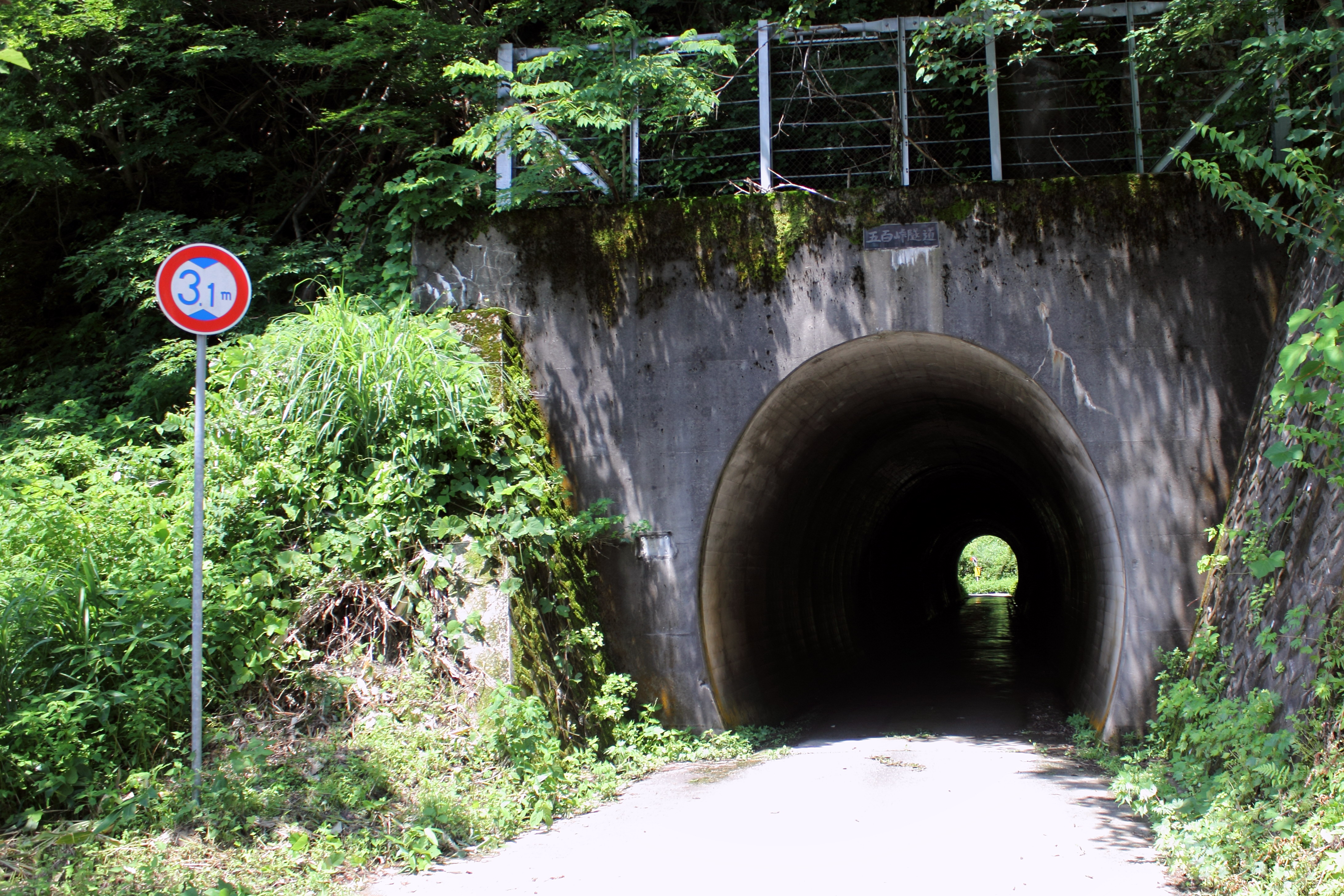 五百峠トンネル（石川県小松市）